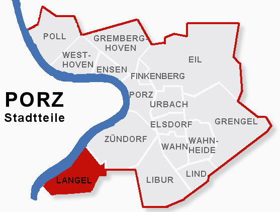 Lage des Stadtteils Langel im Stadtbezik Porz